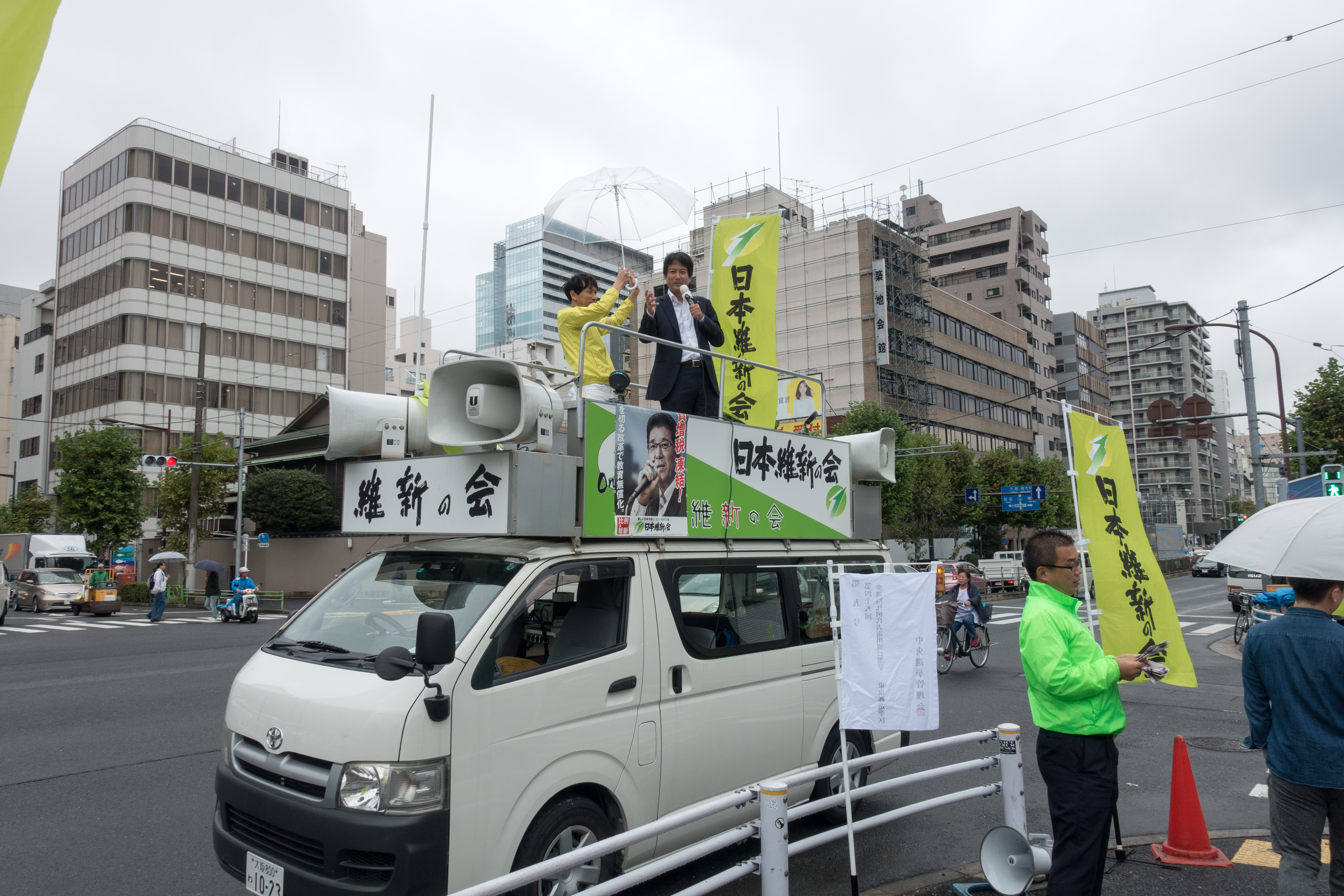 Tsukiji Market